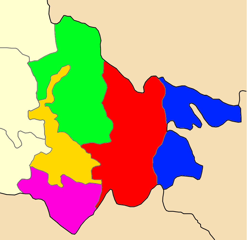 Χάρτης των ενοτήτων (και πρώην δήμων) από τις οποίες αποτελείται ο Δήμος Πέλλας